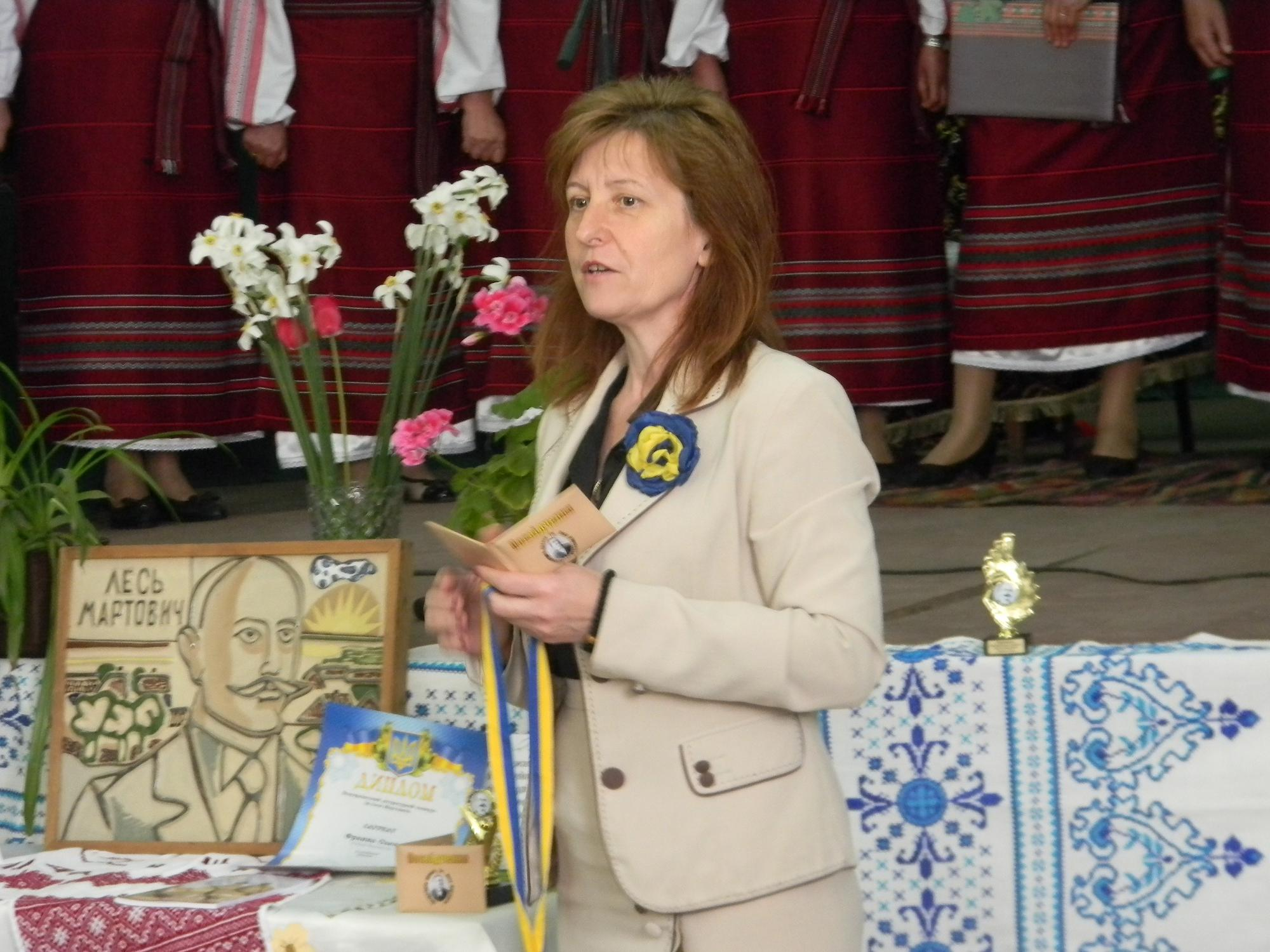 Галина Фесюк під час вручення нагород переможцям конкурсу імені Леся Мартовича, травень 2014